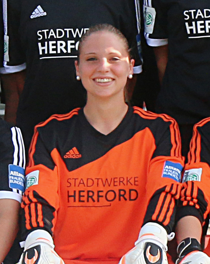 Herforder SV Borussia Friedenstal Team 2014/2015